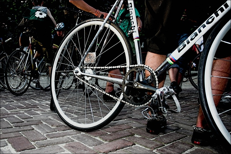 Starrer Gang